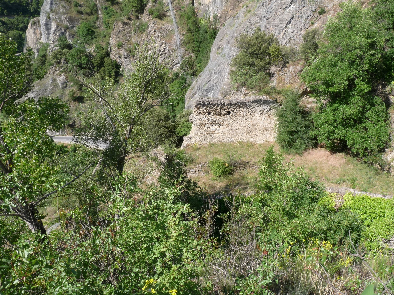 Ancienne église de Serola (ou Eixalada), Canaveilles, Pyrénées-Orientales, France. Vue depuis l'emplacement du château.